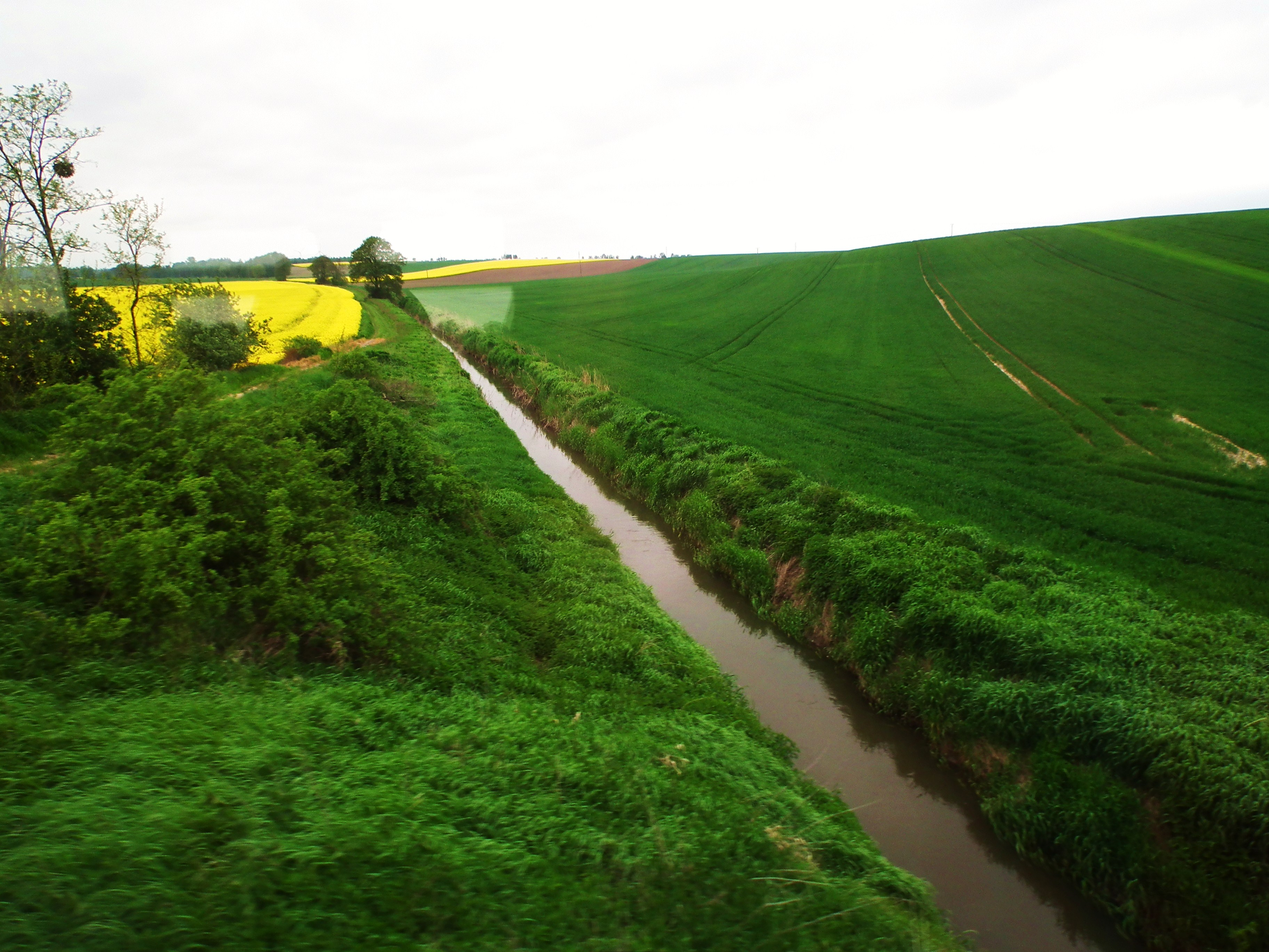 Okolice wsi Gródczanki na Górnym Śląsku. Rzeka Troja.